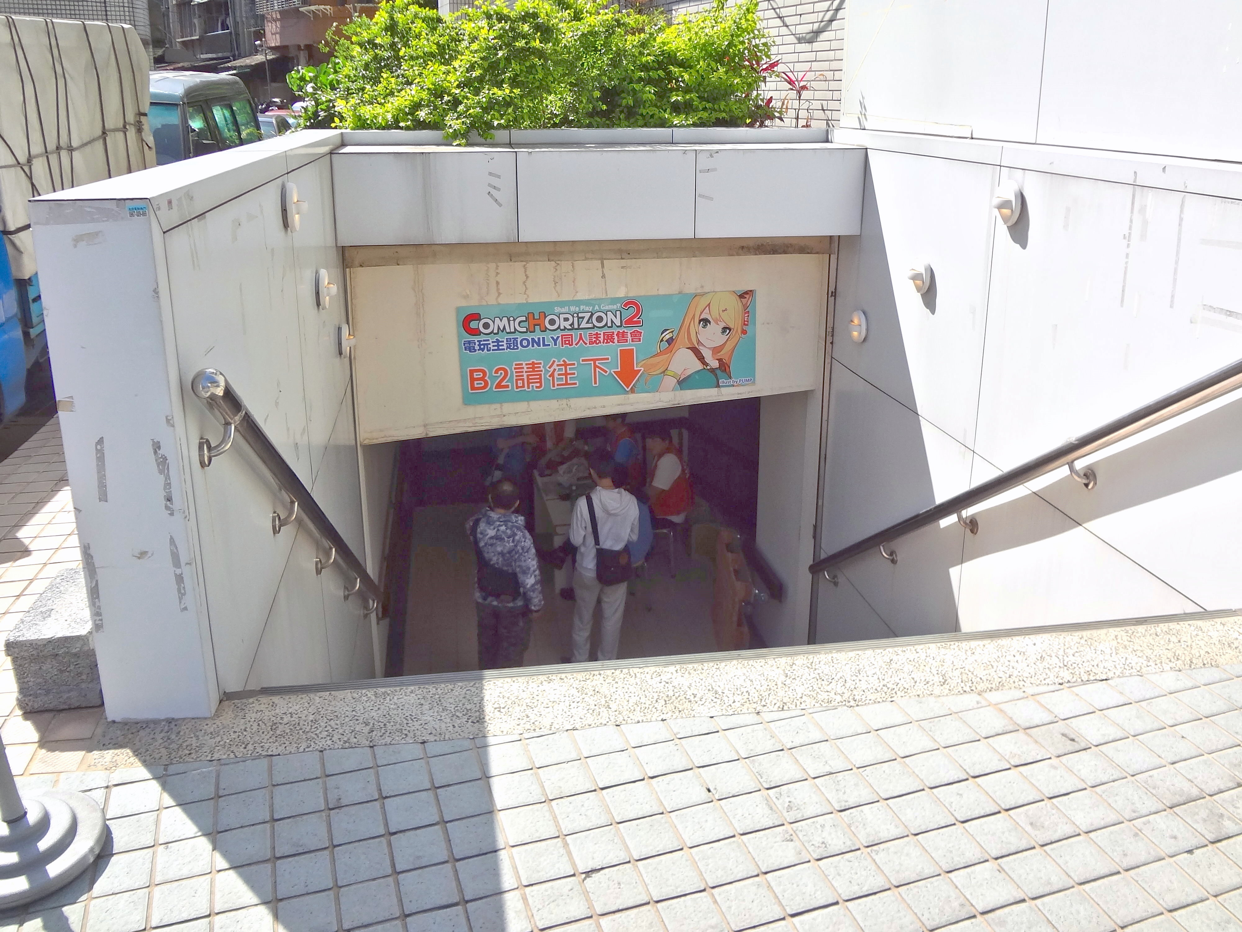 第2屆漫創地平線，卡市達創業加油站創新基地入口，報到處設於此。